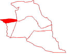 Ubicación de la parroquia San José en el municipio Miranda, estado Zulia, Venezuela